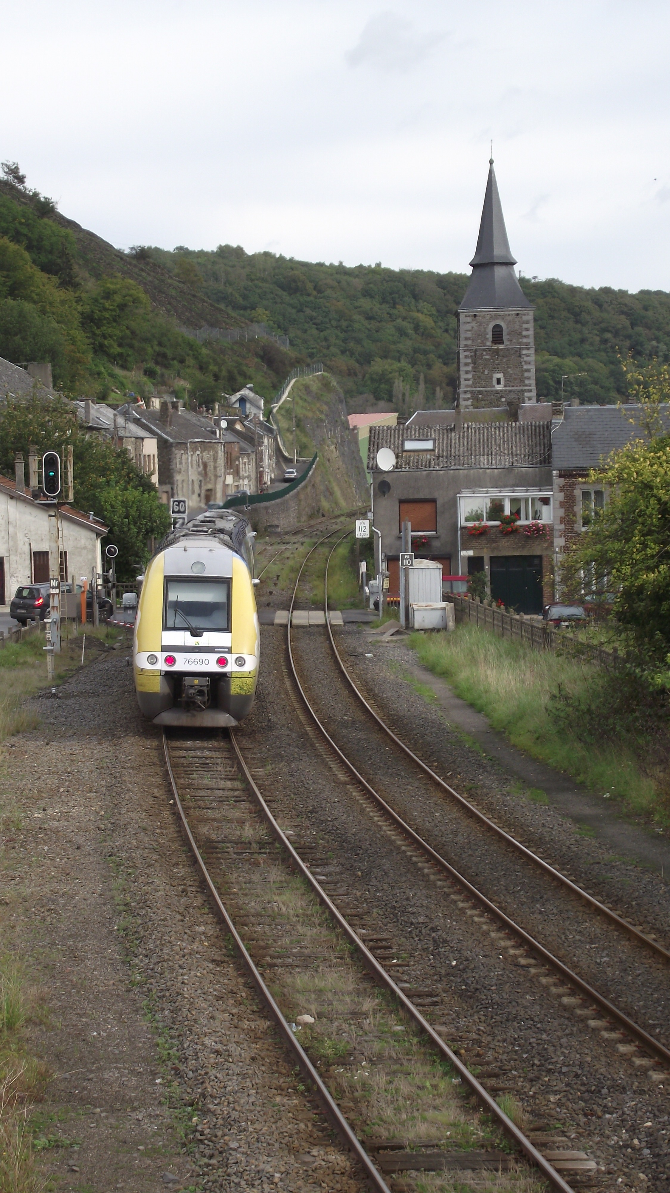 Ter trein richting Givet gezien vanaf de loopbrug.